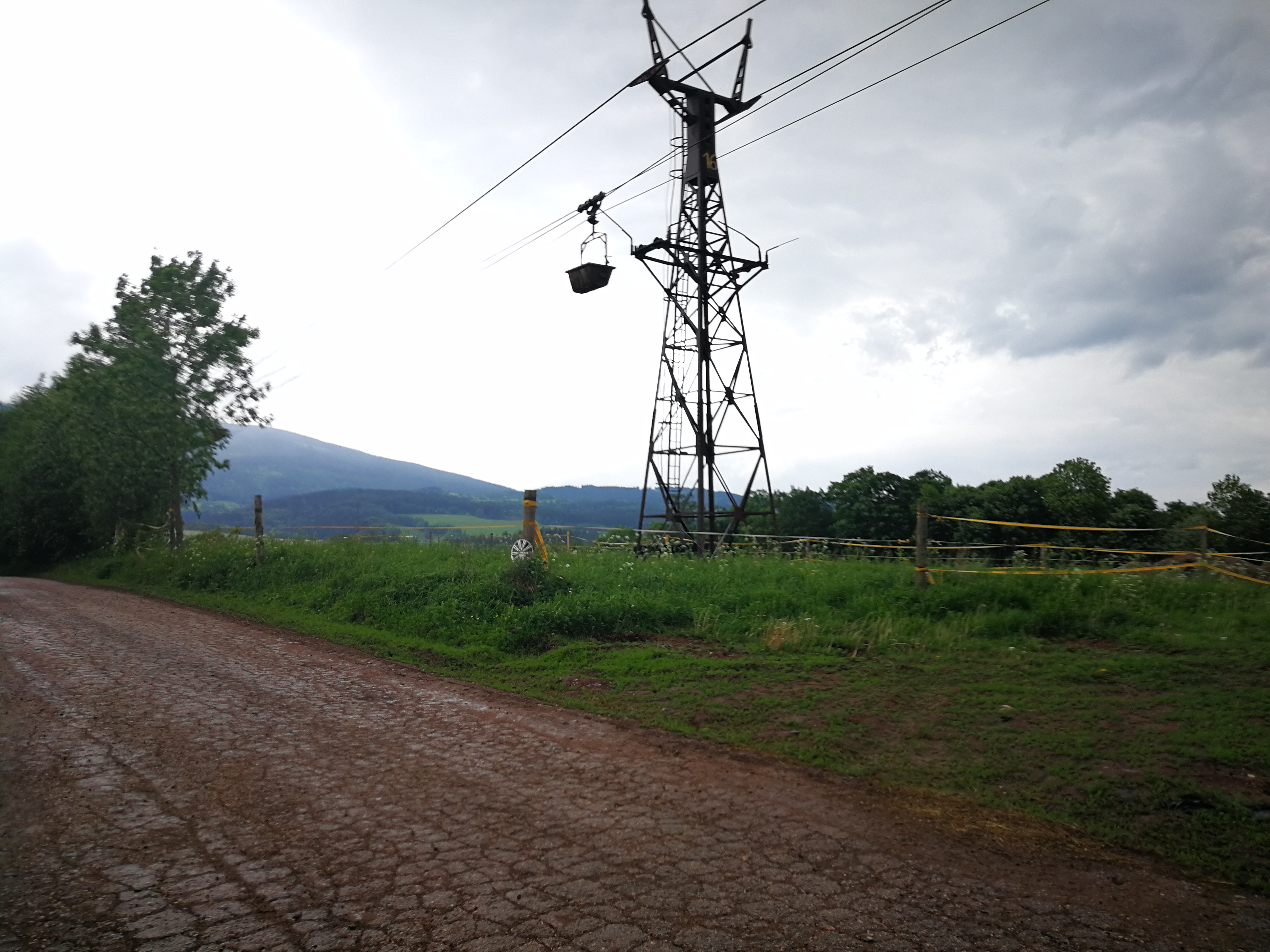 Kovársko Project: Fotíme Česko